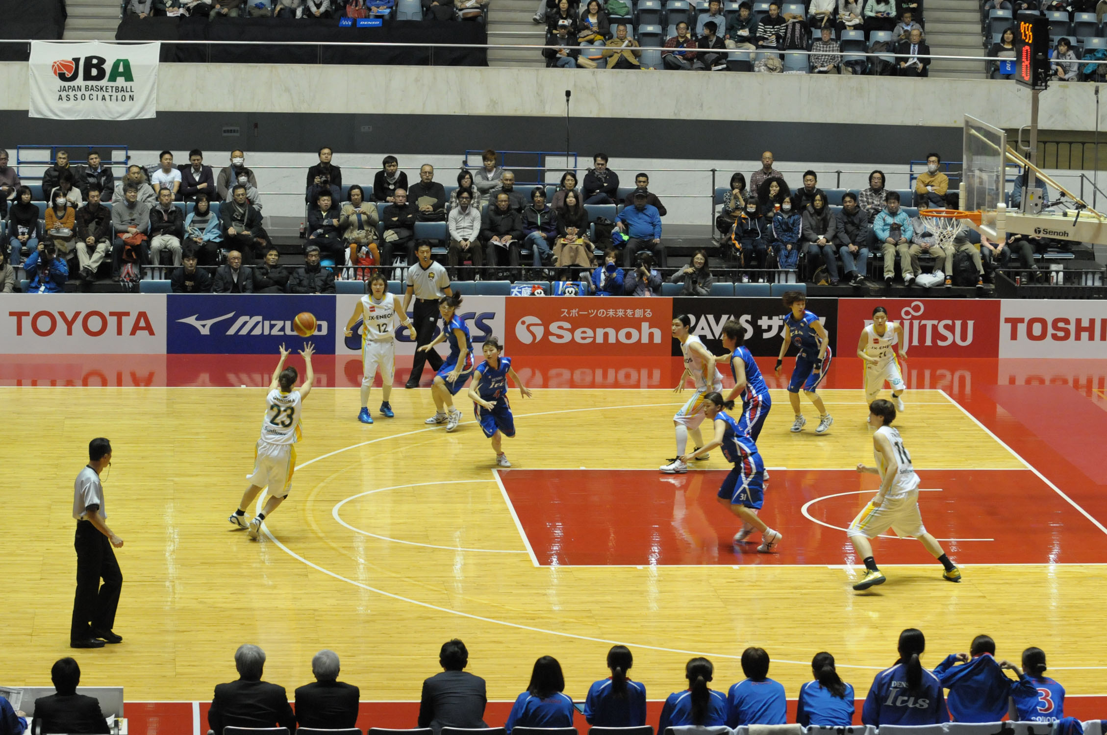 2014年全日本総合バスケットボール選手権大会準々決勝、JX-ENEOSサンフラワーズ対デンソーアイリス。代々木第一体育館で。